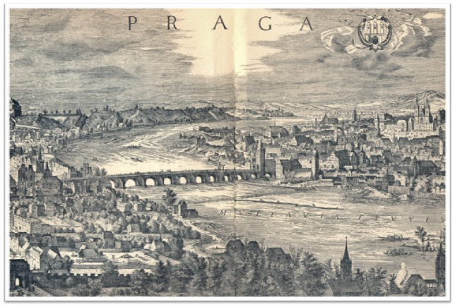 Praha, Malá strana a Staré město, rytina podle kresby J. Sadelera 1607